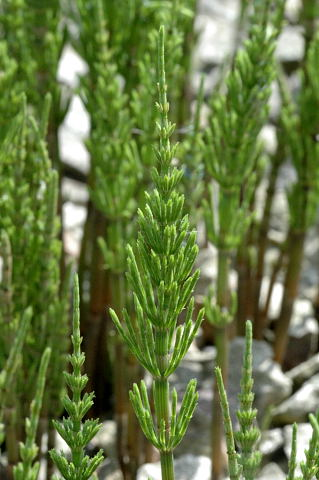 Picture taken in Commanster, Belgian High Ardennes . Species: Equisetum arvense